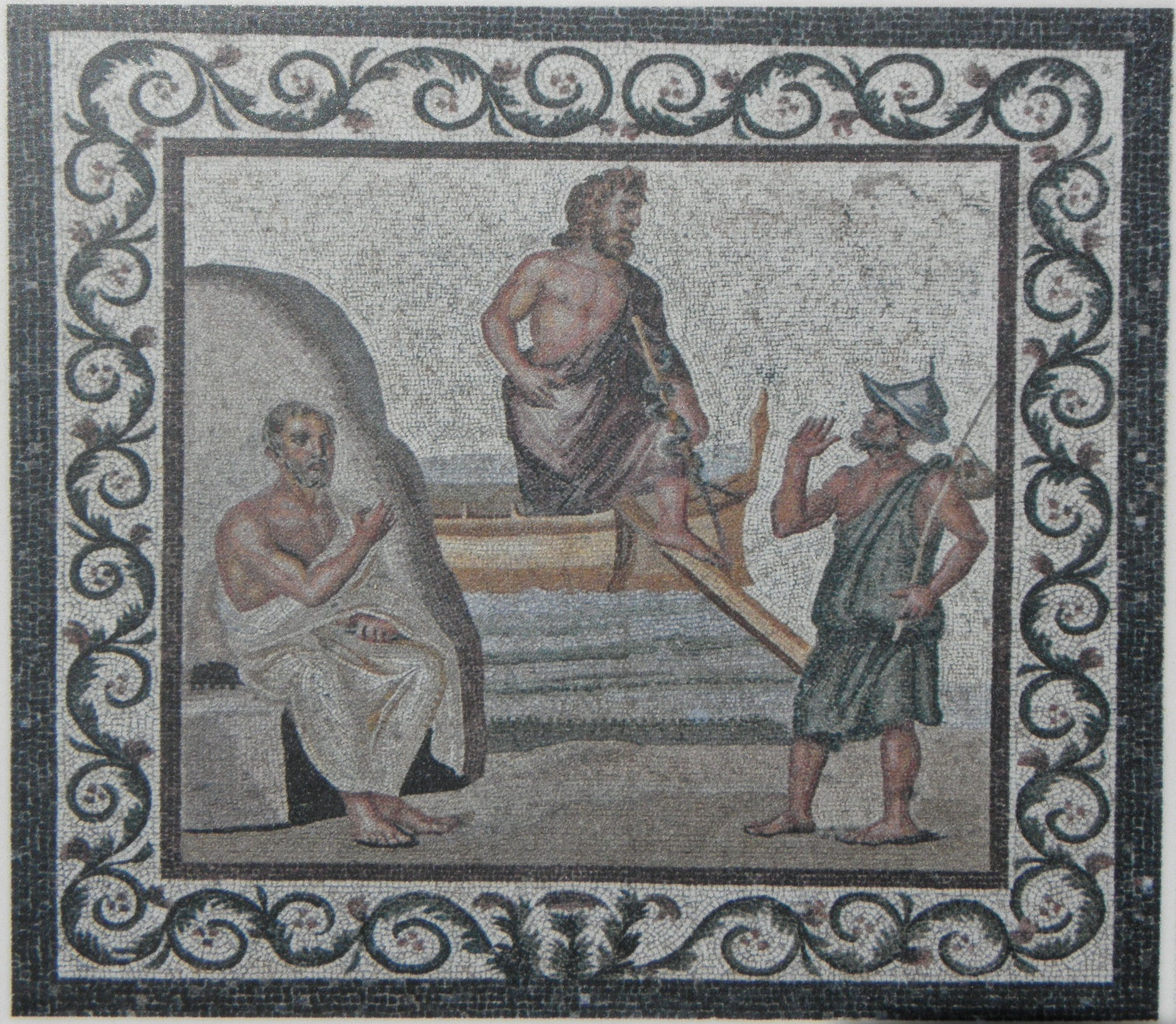 Mozaika Příjezd Asklépia, Archeologické muzeum v Kósu; Kós (GR)